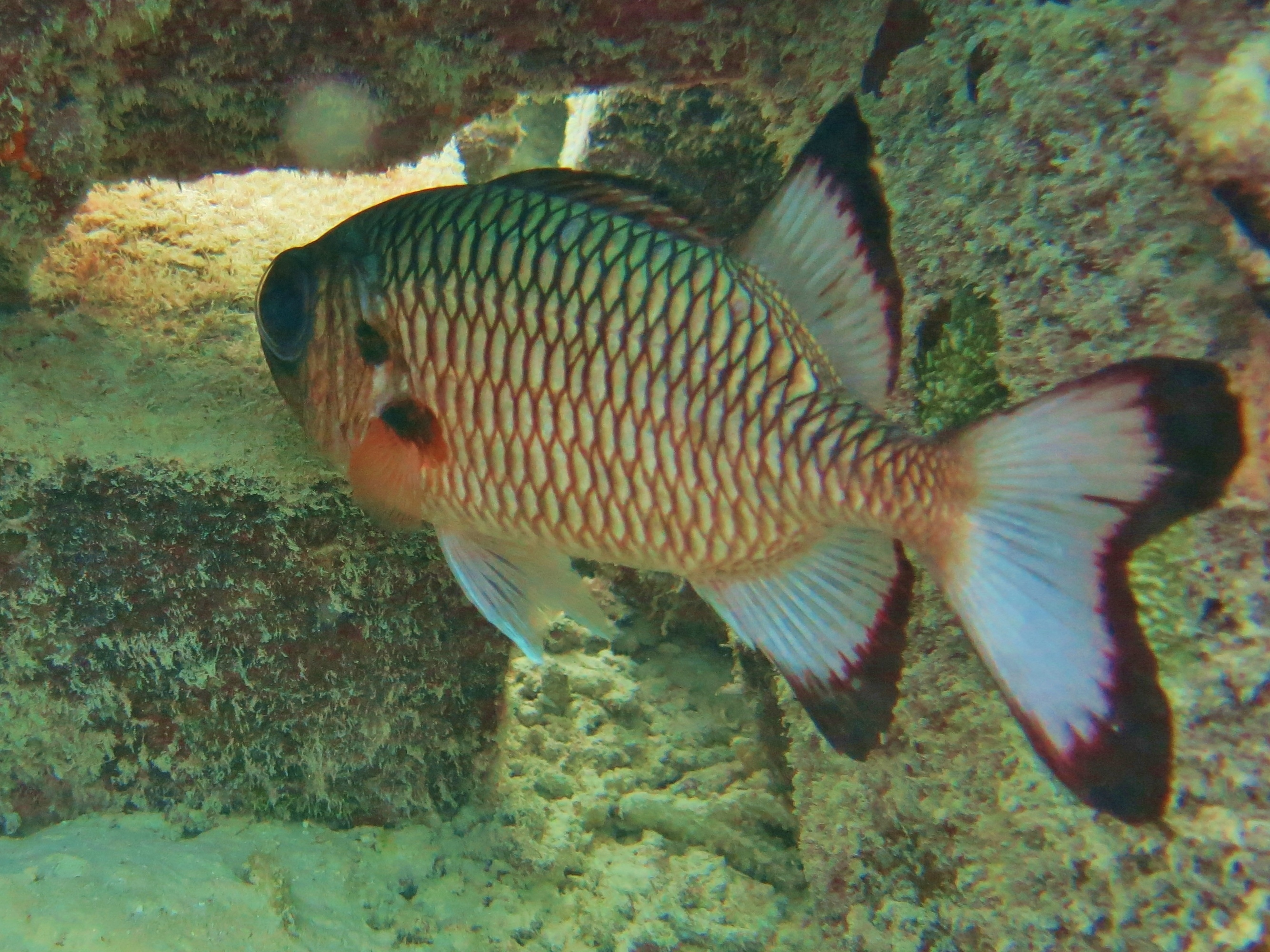 Un poisson-soldat pourpre (Myripristis adusta) aux Maldives (atoll de Baa).